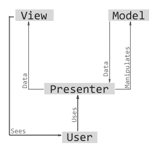 Диаграмма шаблона проектирования MVP